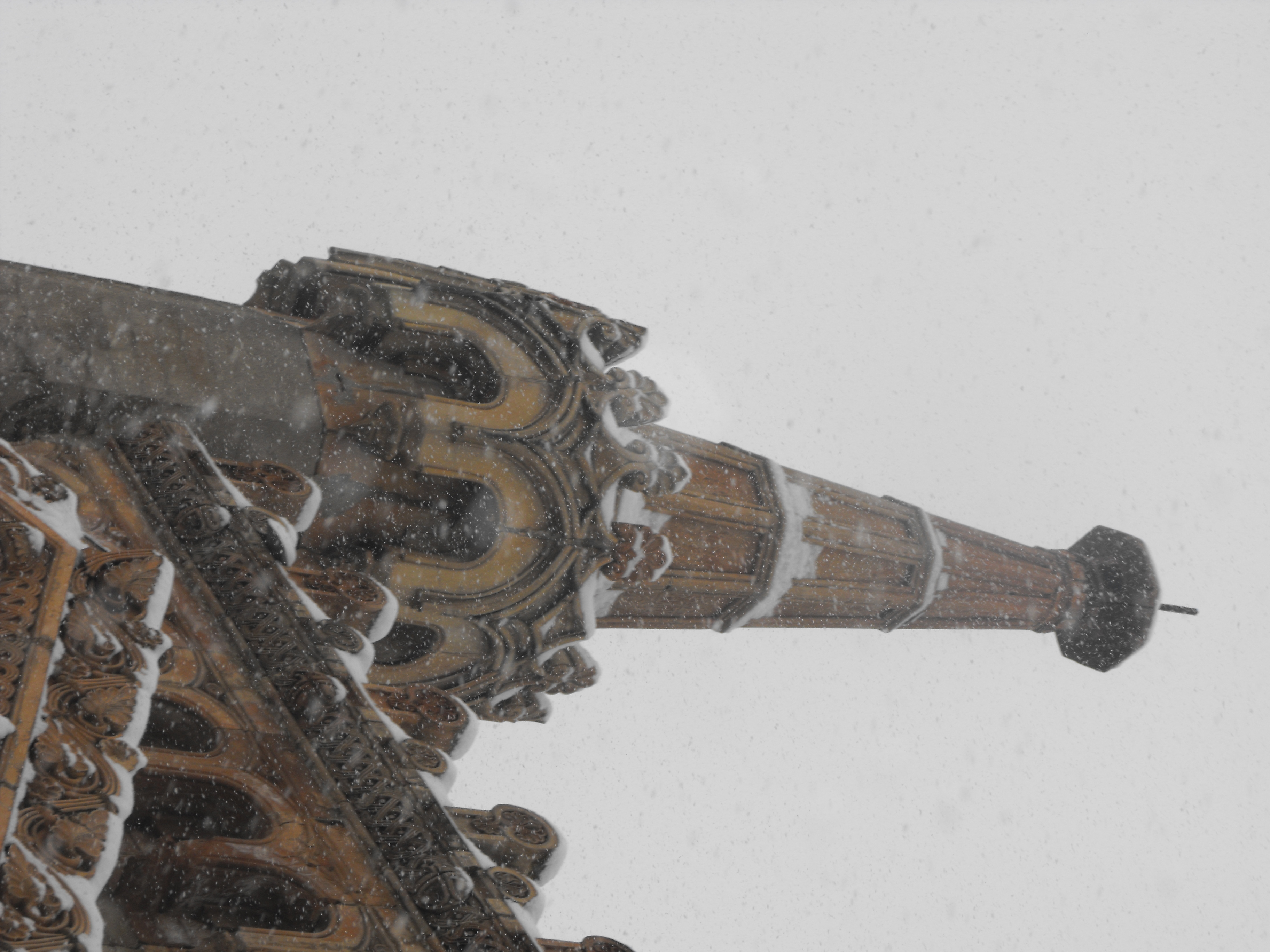 Mausoleul familiei Filișanu 01